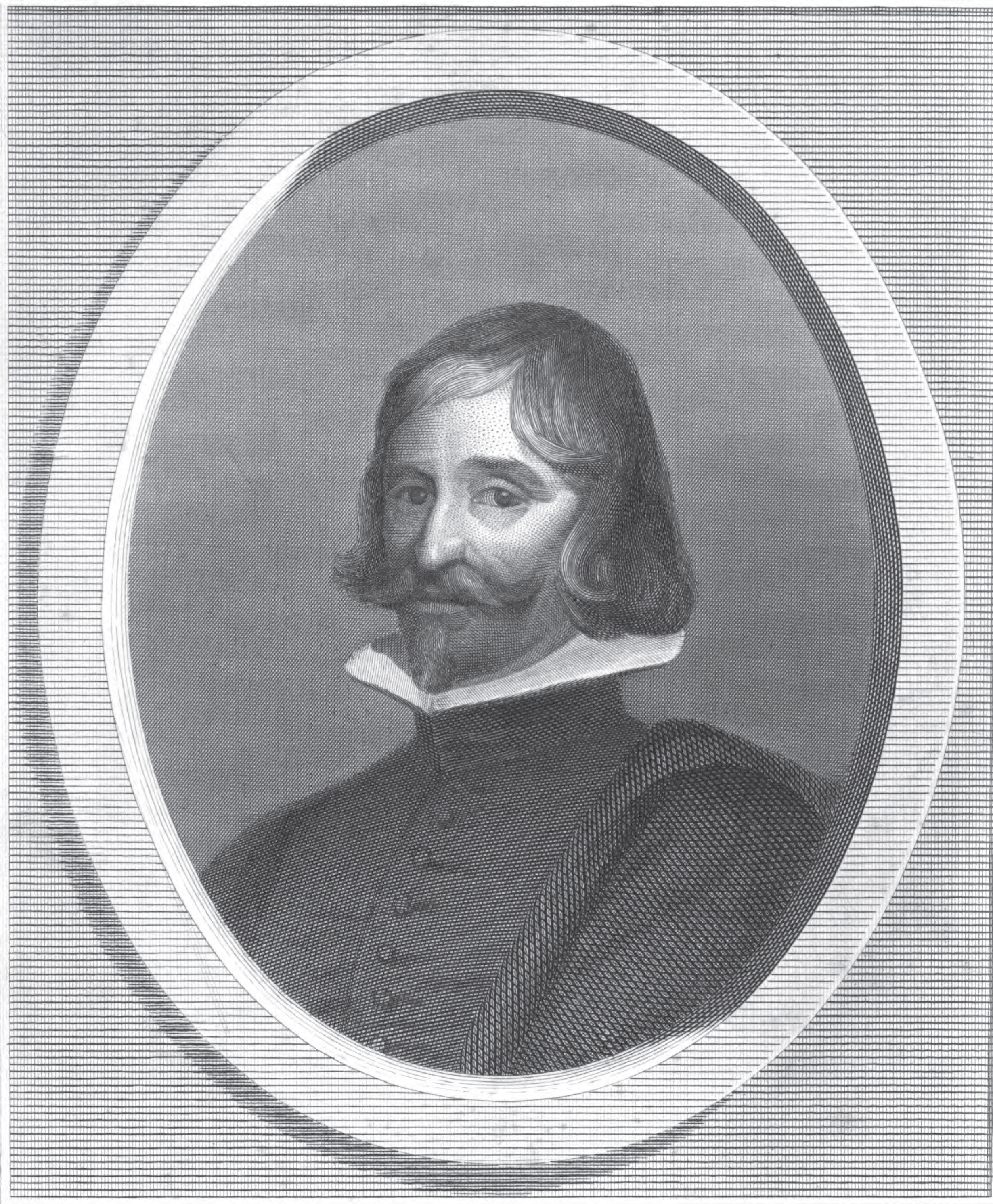 Ritratto di Jusepe Martínez, pittore di Filippo IV, che fece il figlio di Martinez. Il ritratto assomiglia questo ritratto qui.